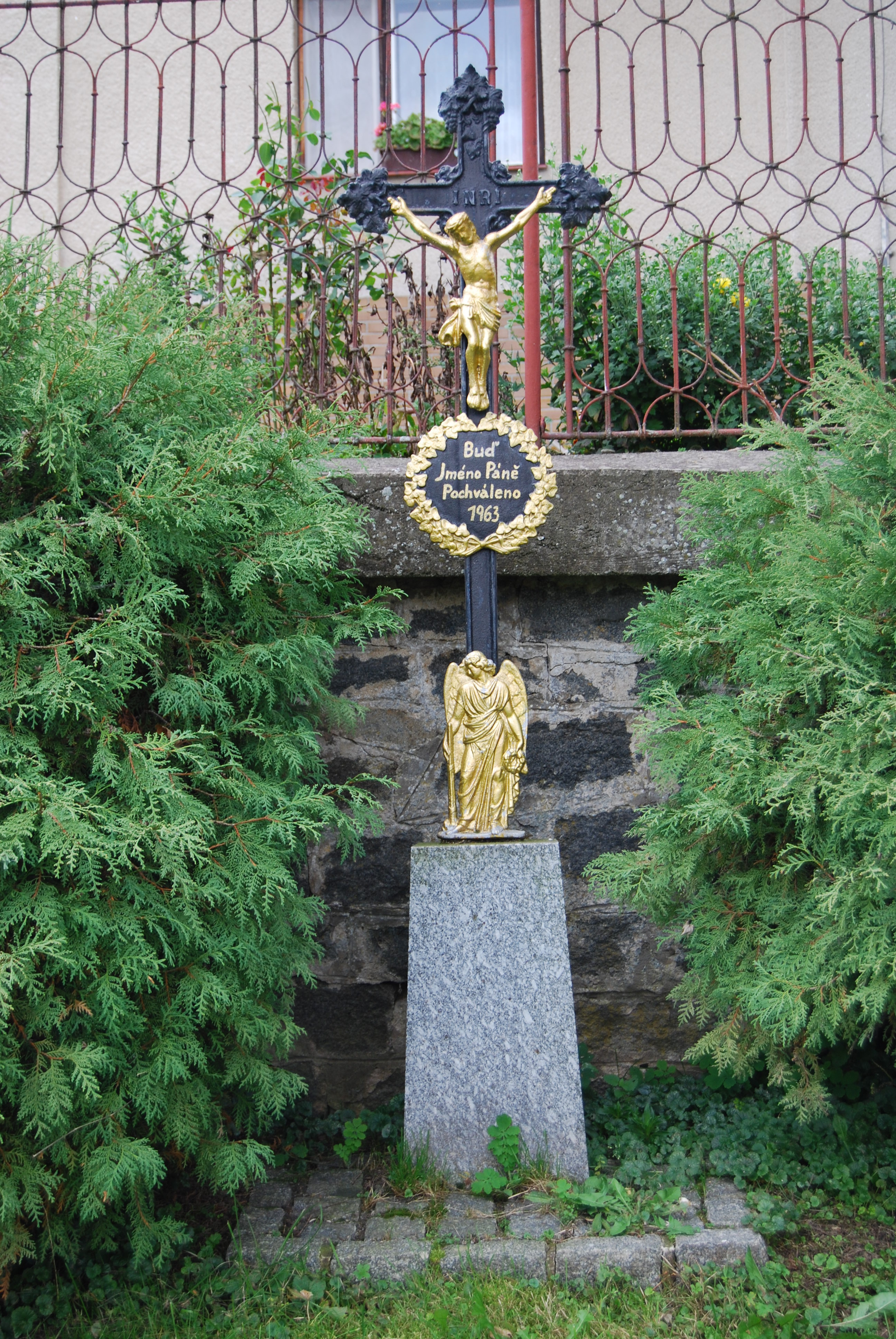 Kříž v obci. Horní Nerestce je část obce Nerestce v okrese Písek. Česká republika.